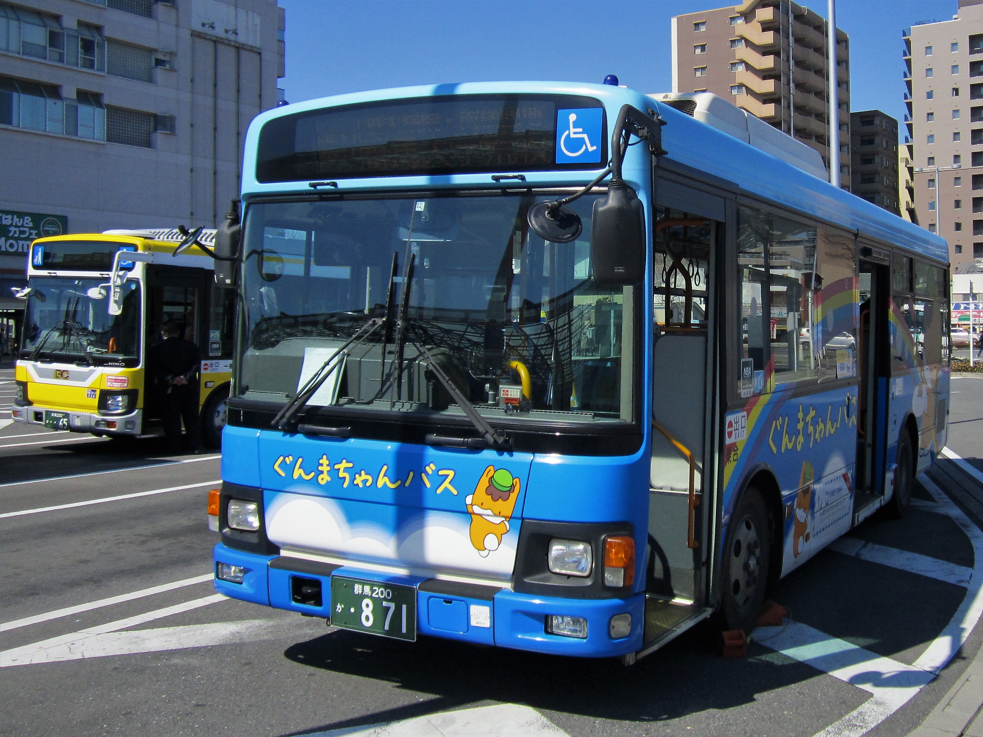 前橋駅北口に停車中の関越交通 ぐんまちゃんバス（夏） Canon PowerShot A2200